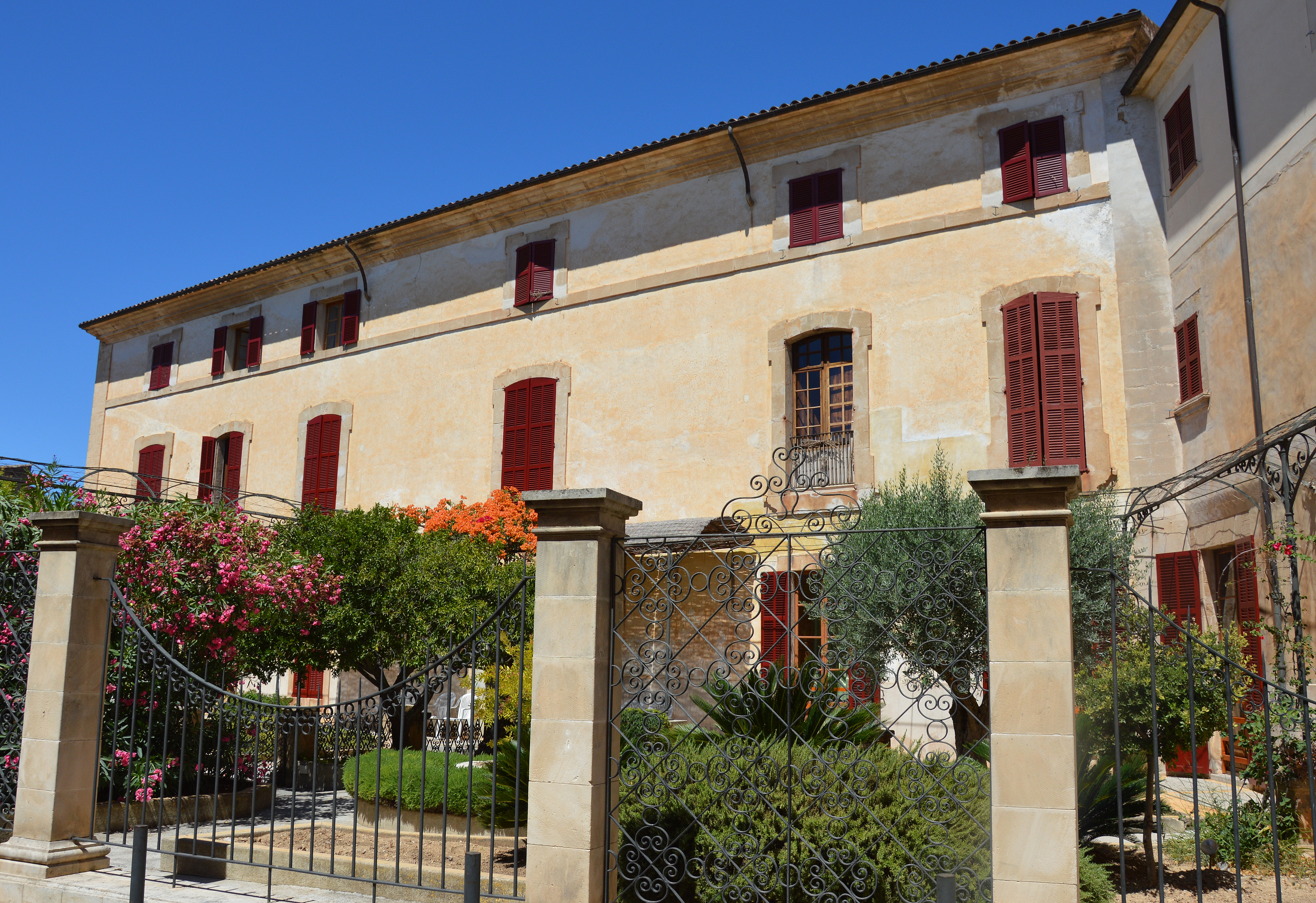 Haus Posada dels Olors in Arta